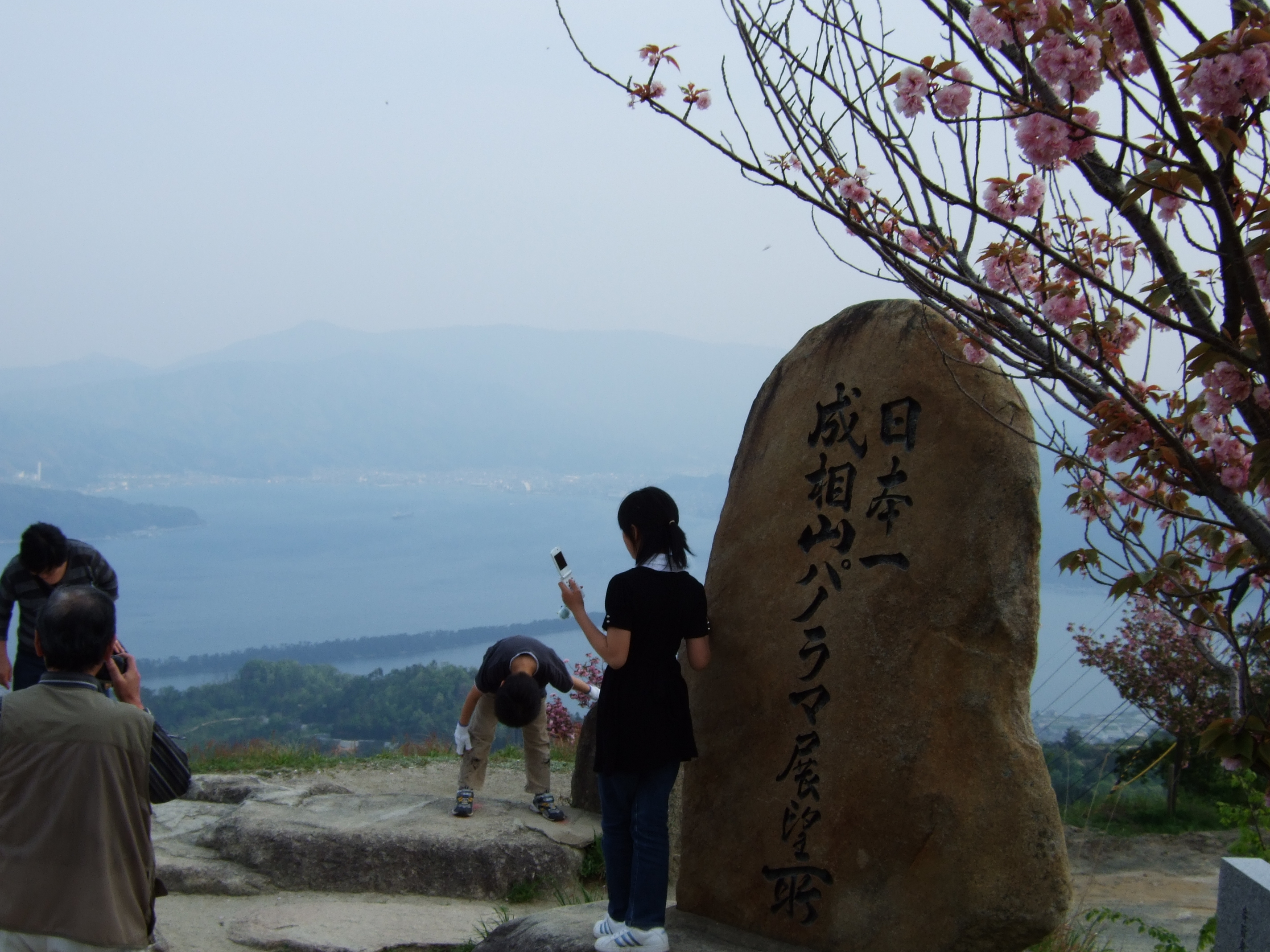 成相寺